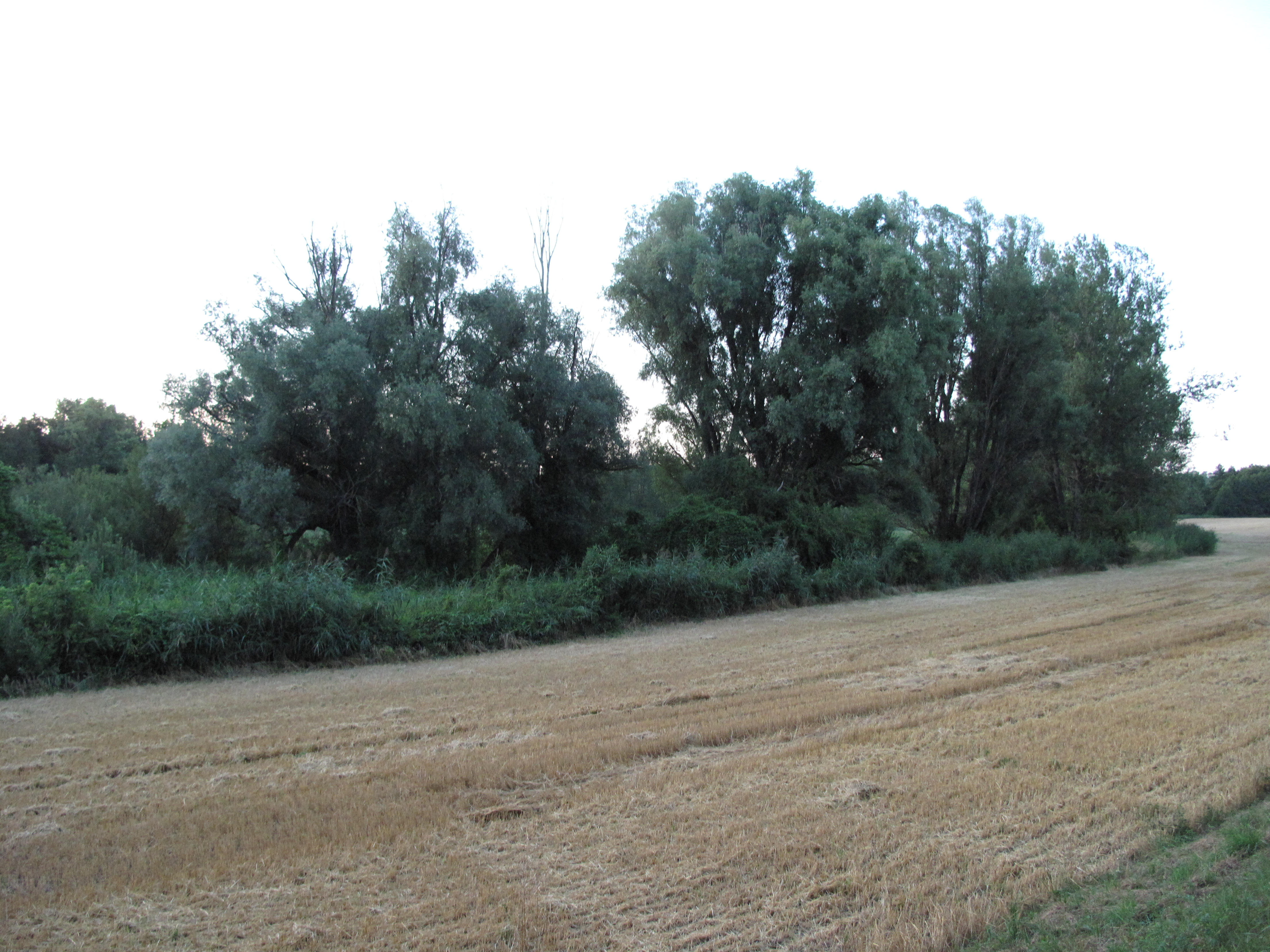 Přírodní památka Oleksovická mokřina. Okres Znojmo, Česká republika.